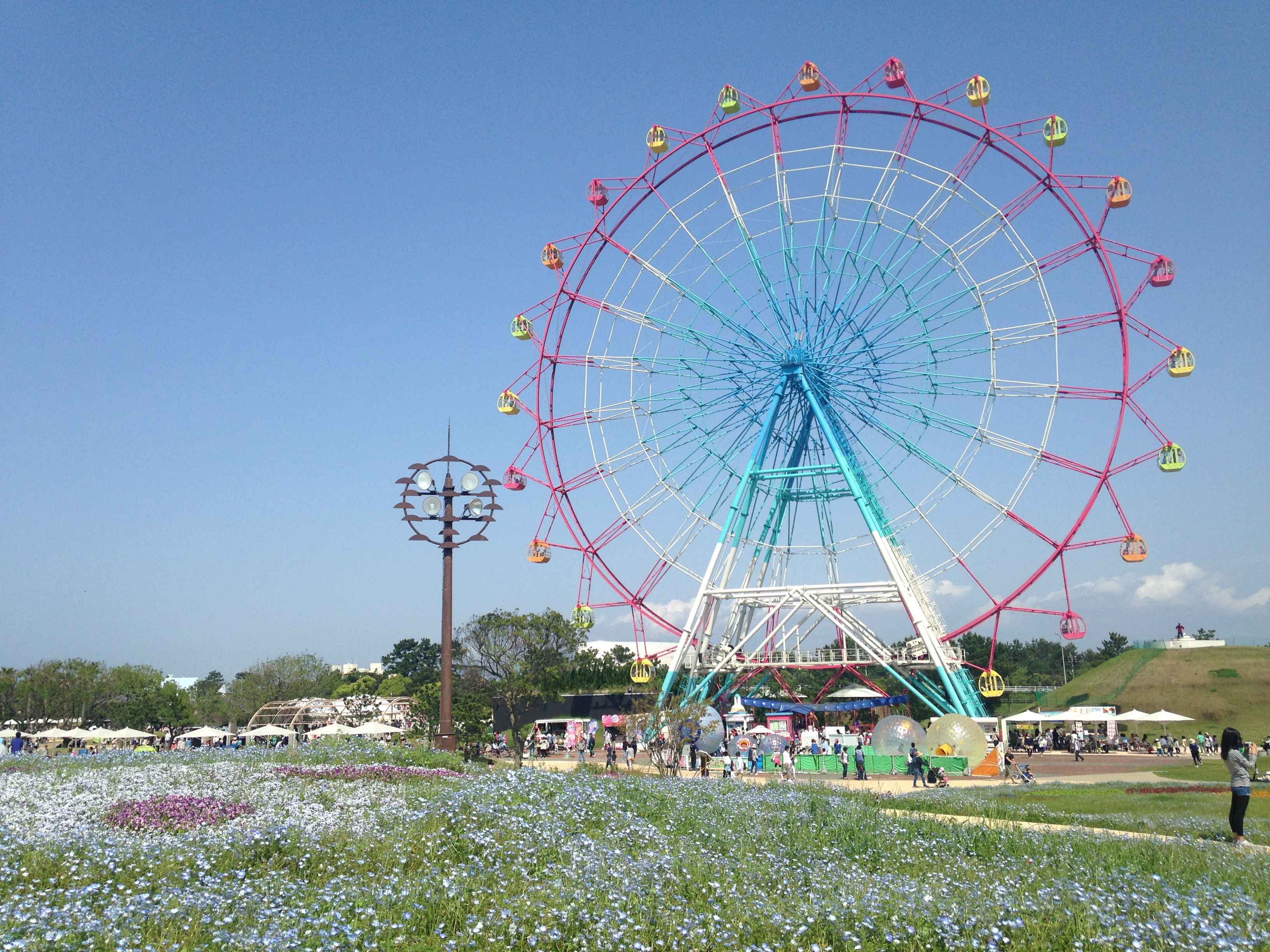 海の中道海浜公園の観覧車とネモフィラ